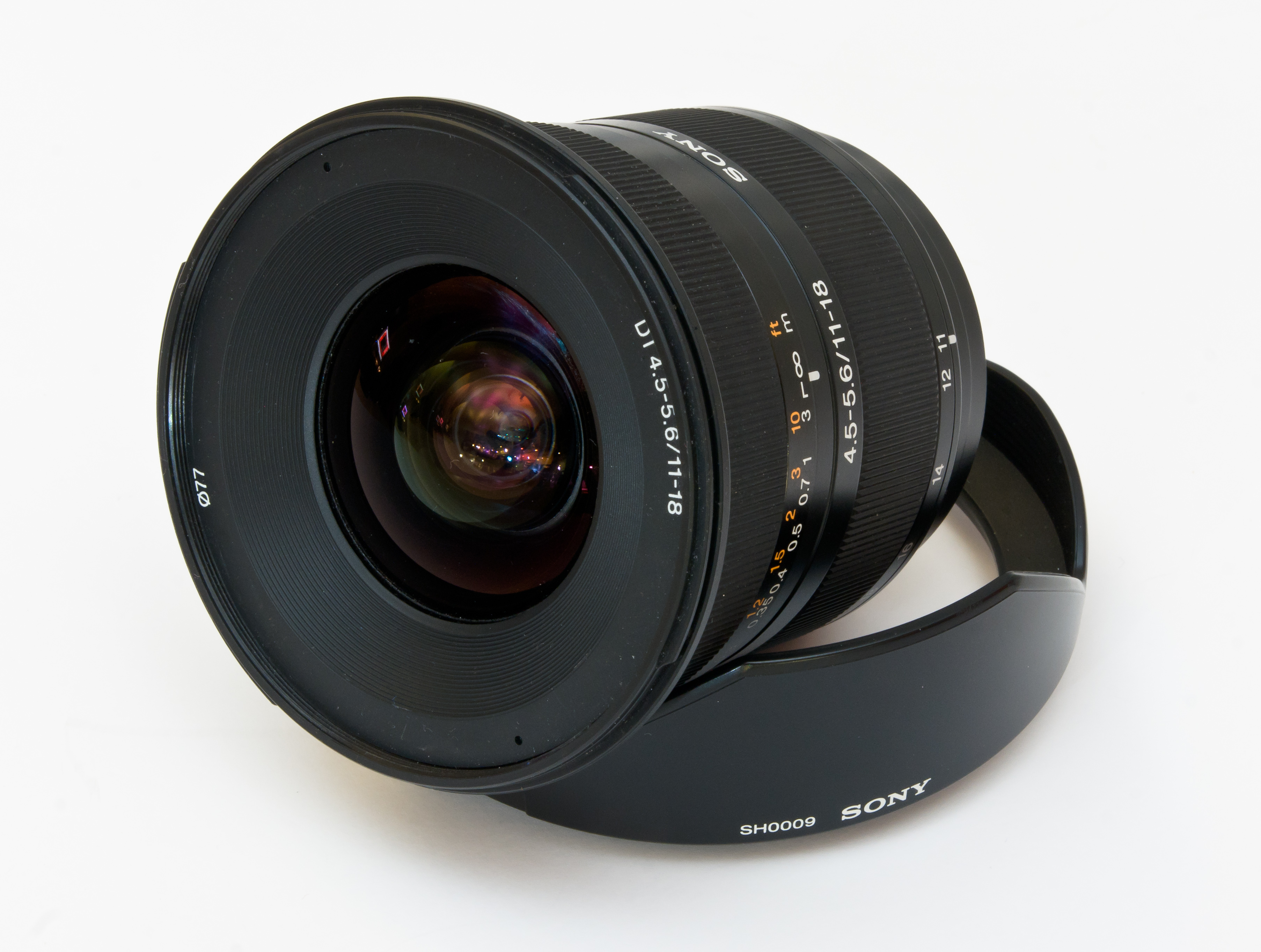 Superszerokokątny obiektyw zmiennoogniskowy Sony SAL-1118 o ogniskowej 11-18 mm, wypożyczony CLI na czas Wikiekspedycji 2012 przez firmę Sony Polska.